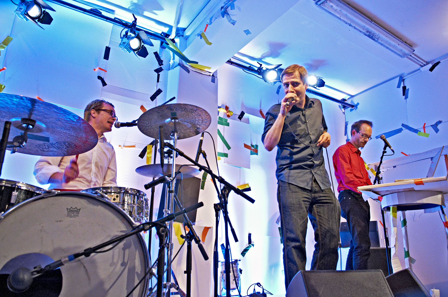 Andreas Dorau bei den Konspirativen KüchenKonzerten